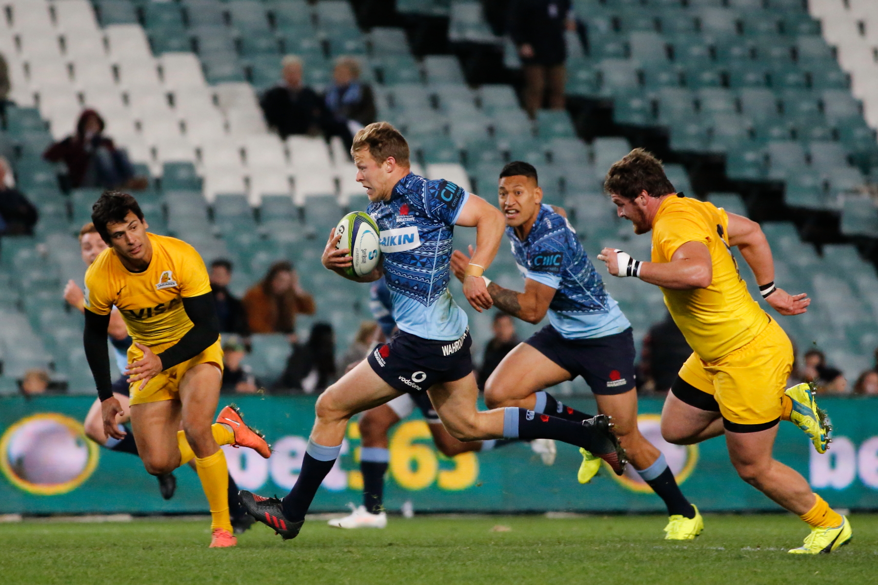 2017.07.08.21.29.54-WARvJAG-0002